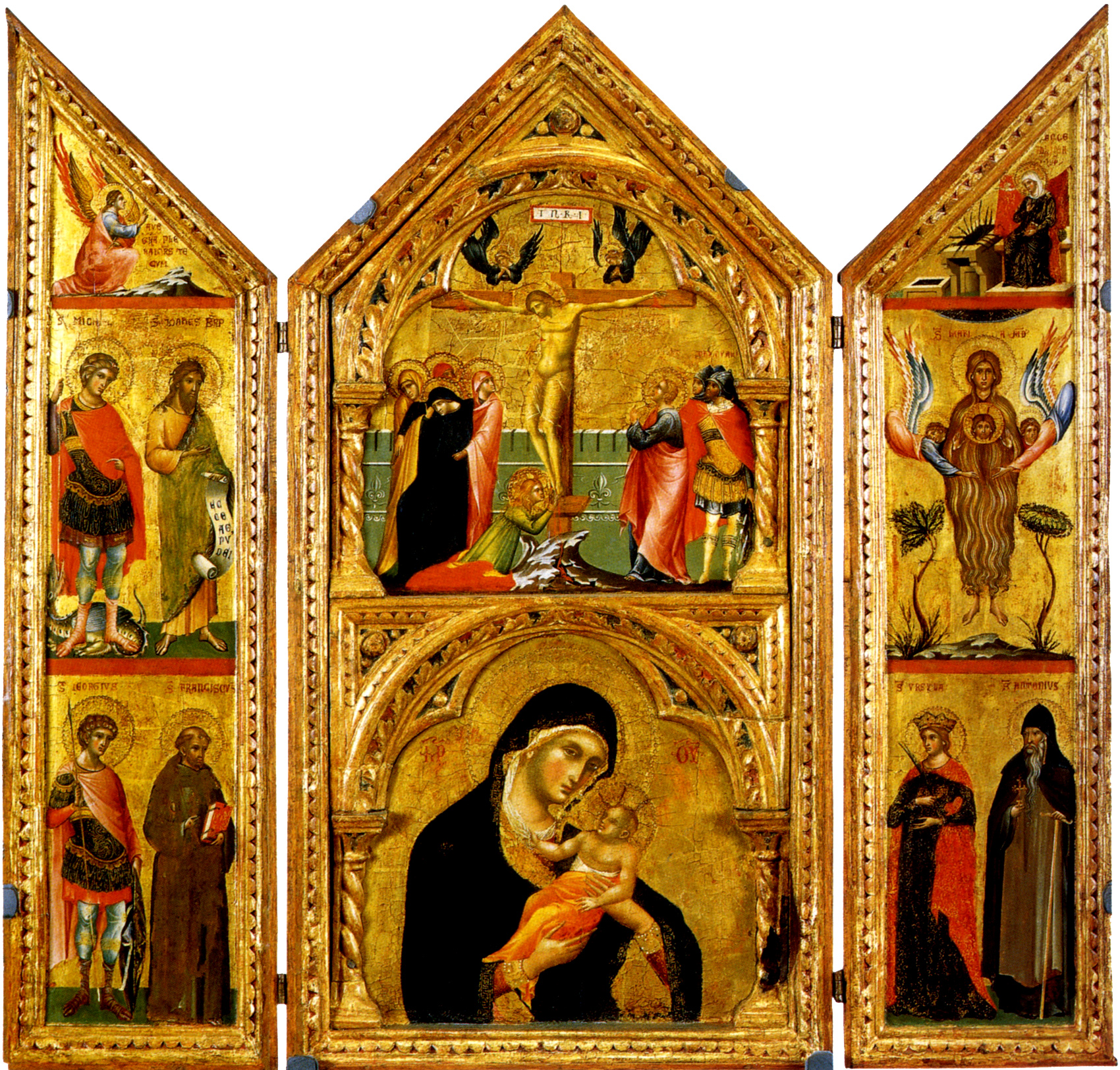 Portable Altar